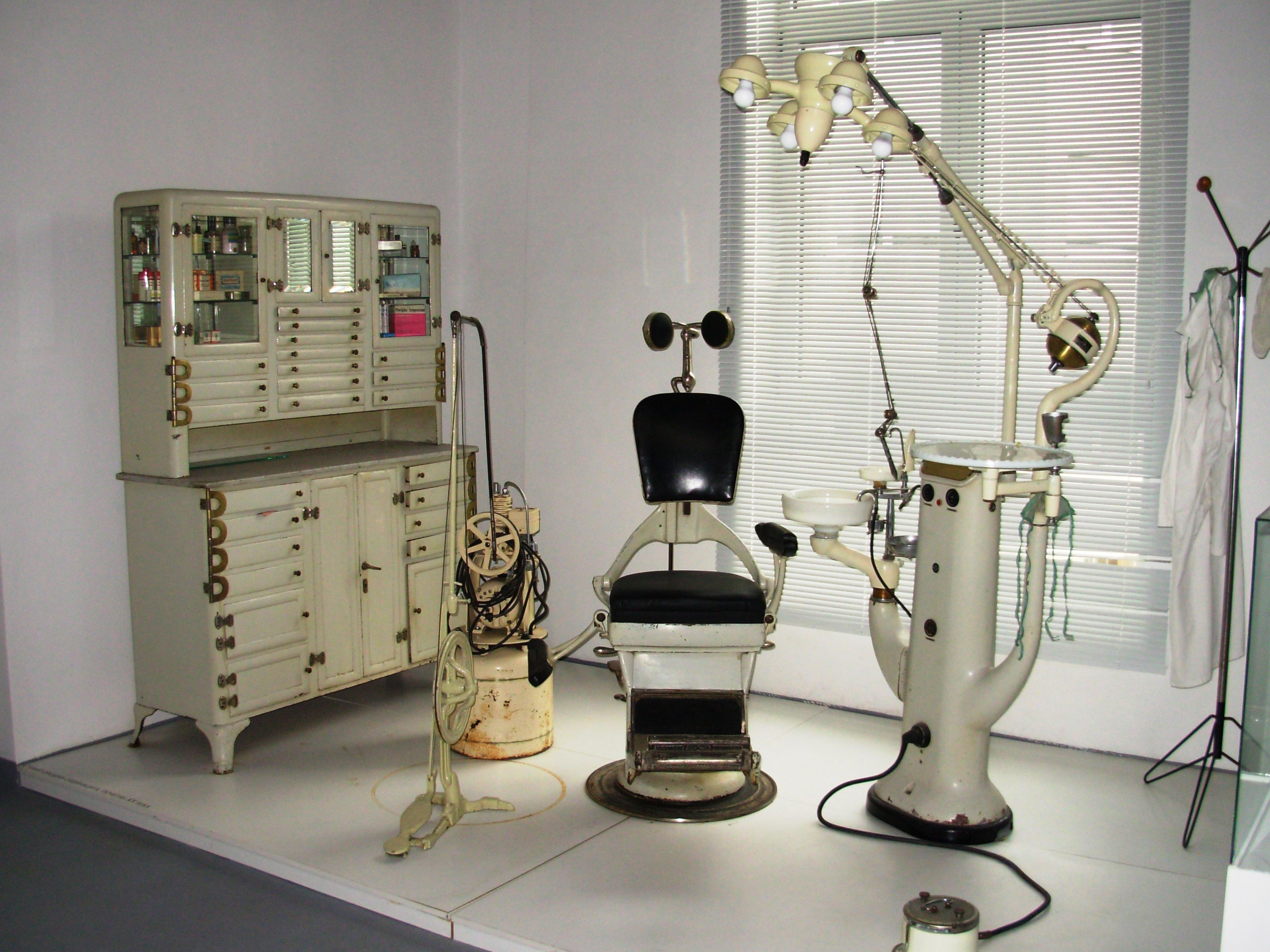 Стоматолошка ординација око 1950. Музеј науке и технике, Београд. Сликао Голдфингер